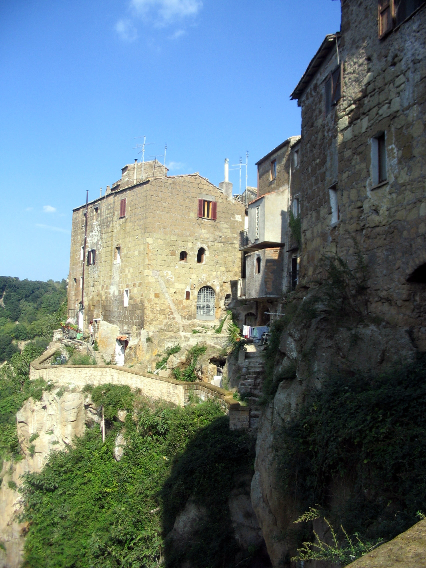 Calcata, Lazio, Italia